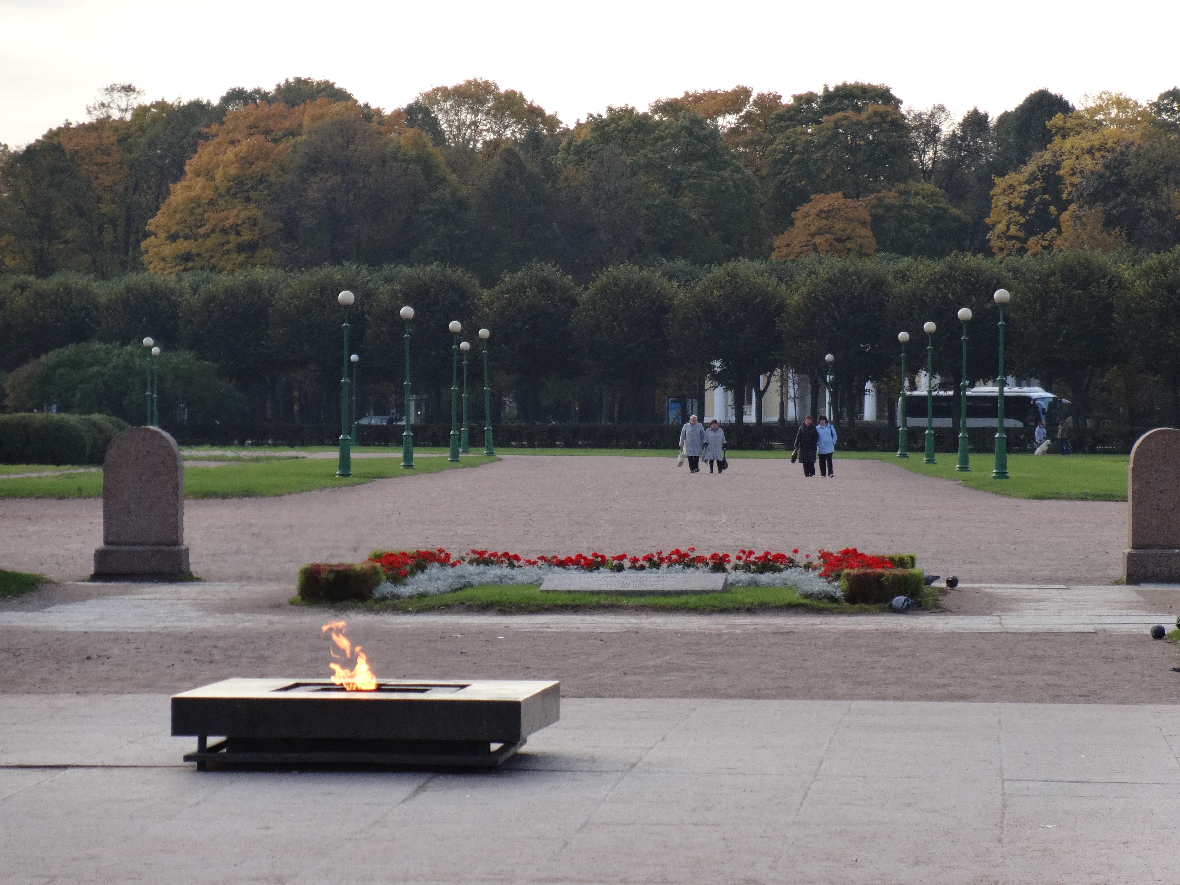 (Санкт-Петербург и Лен.область, Санкт-Петербург, Марсово поле)